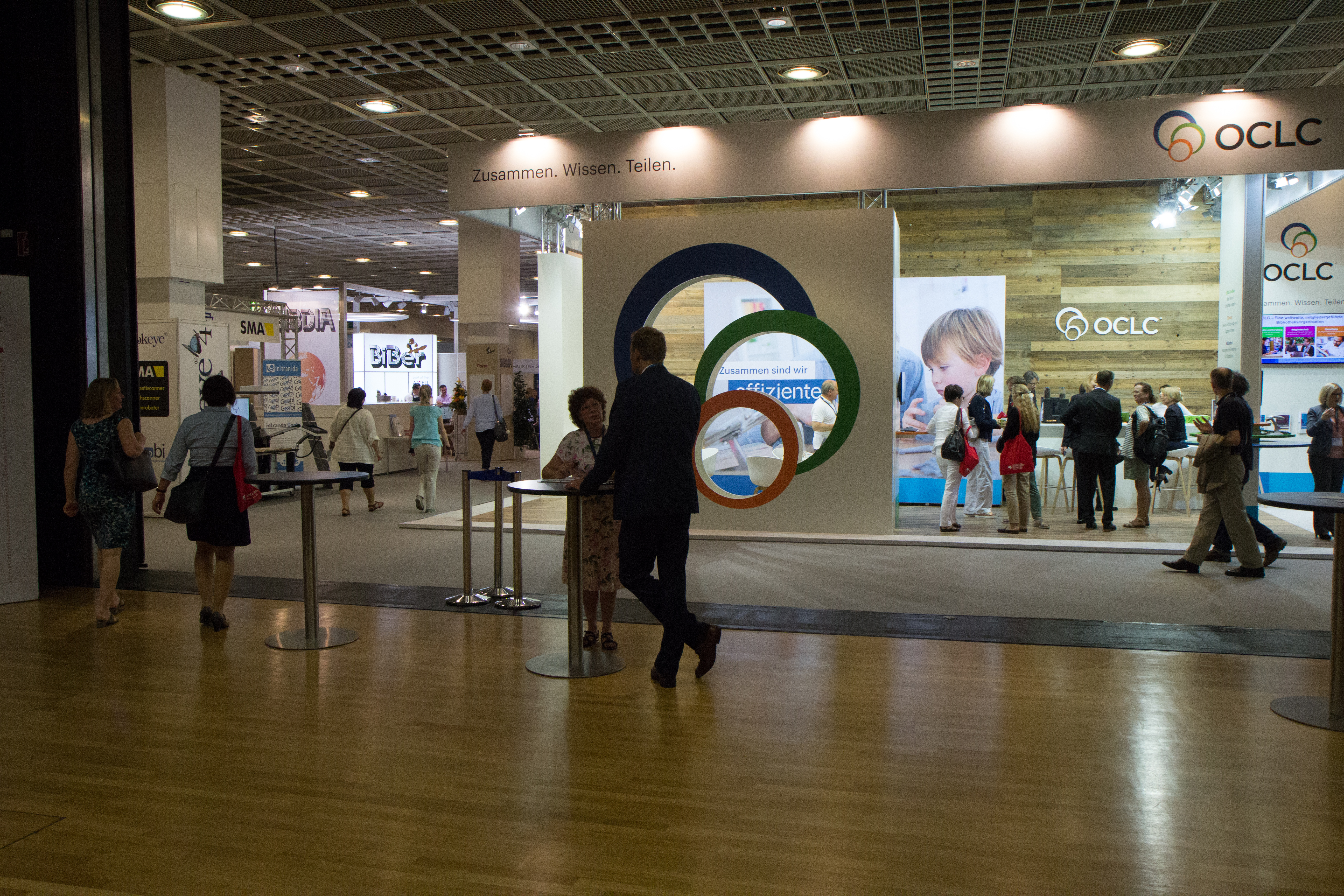 106. Deutscher Bibliothekartag in Frankfurt/Main